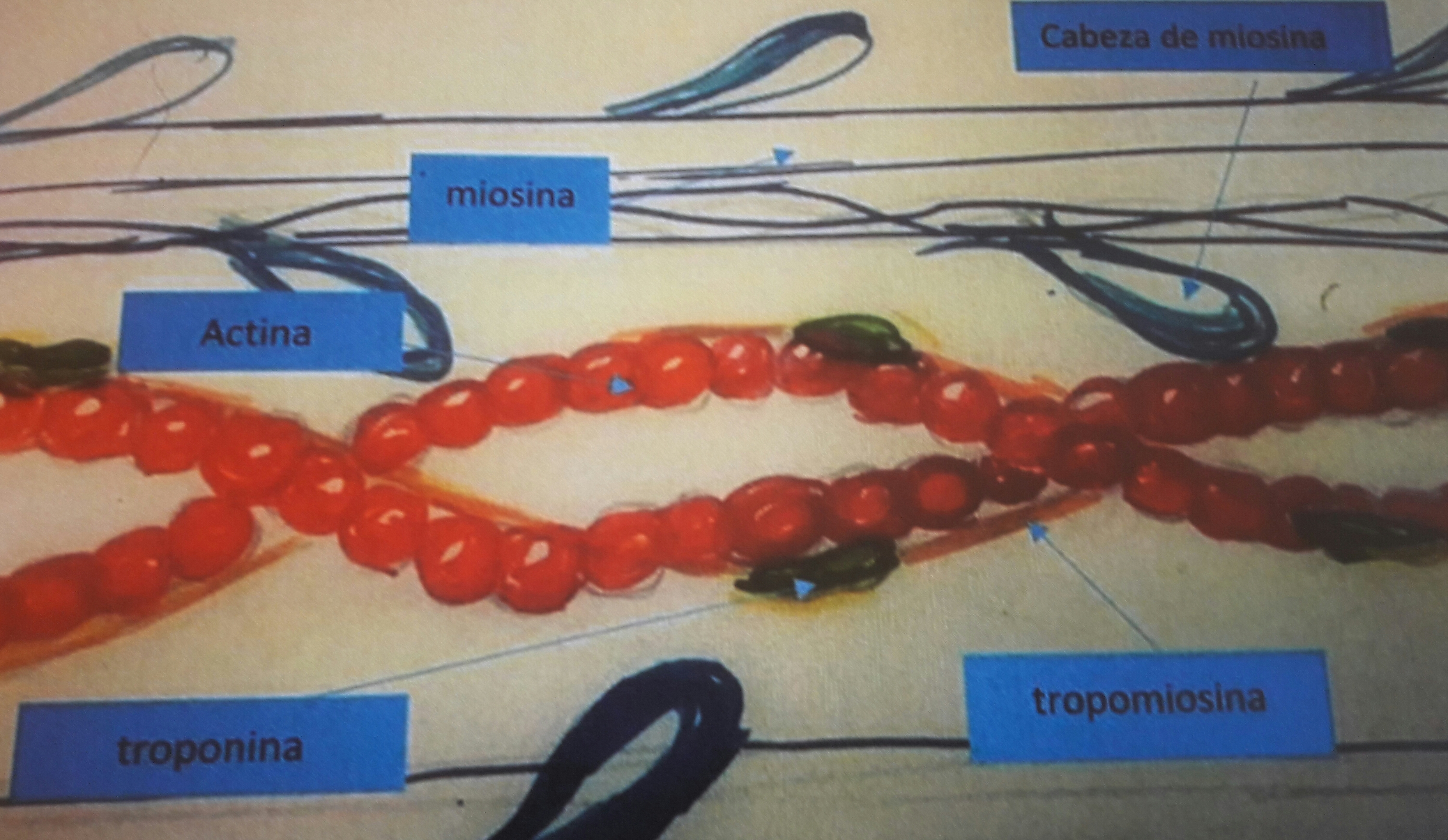 Aquesta imatge mostra com estan disposades les diferents proteïnes que formen el complex actomiosina perquè aquest sigui funcional